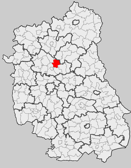 Map of gmina Niedźwiada, Lubartów county, Lublin voivodship Mapa gminy Niedźwiada, powiat lubartowski, województwo lubelskie